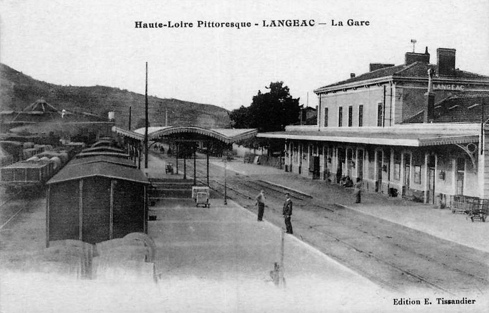 La gare de Langeac est une gare ferroviaire française de la ligne de Saint-Germain-des-Fossés à Nîmes-Courbessac (dite aussi ligne des Cévennes). Elle est située à 200 mètres du centre ville de Langeac, dans le département de la Haute-Loire en région Auvergne.